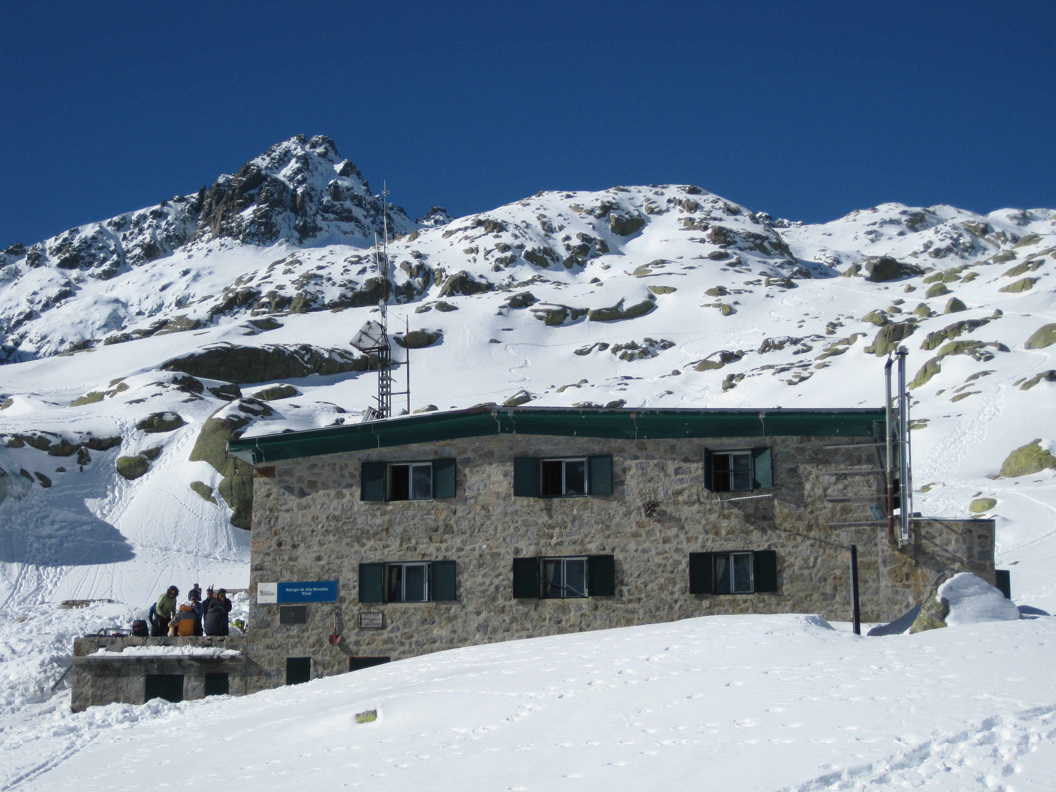 Refugio Elola mit Pico Almanzor im Hintergrund